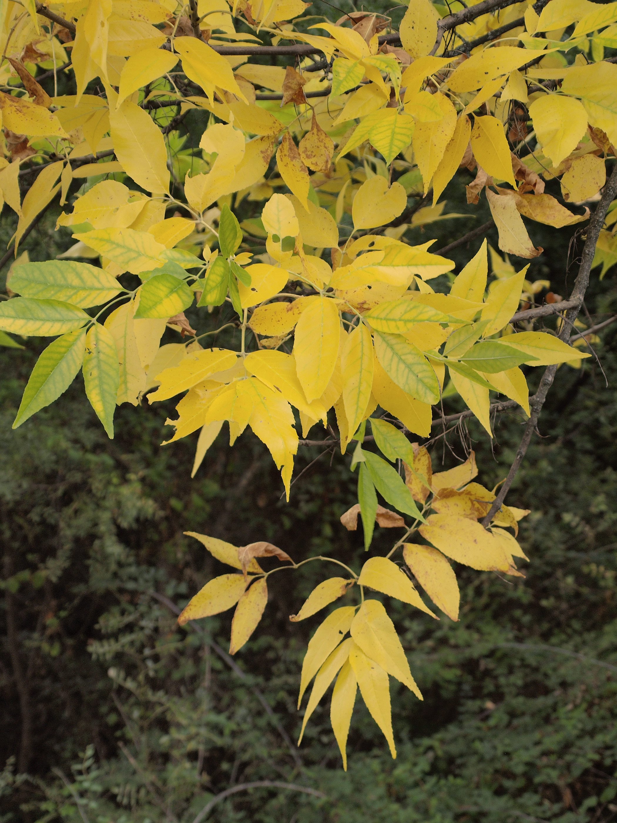 Orno (Fraxinus ornus). Losar de la Vera (Cáceres, España)